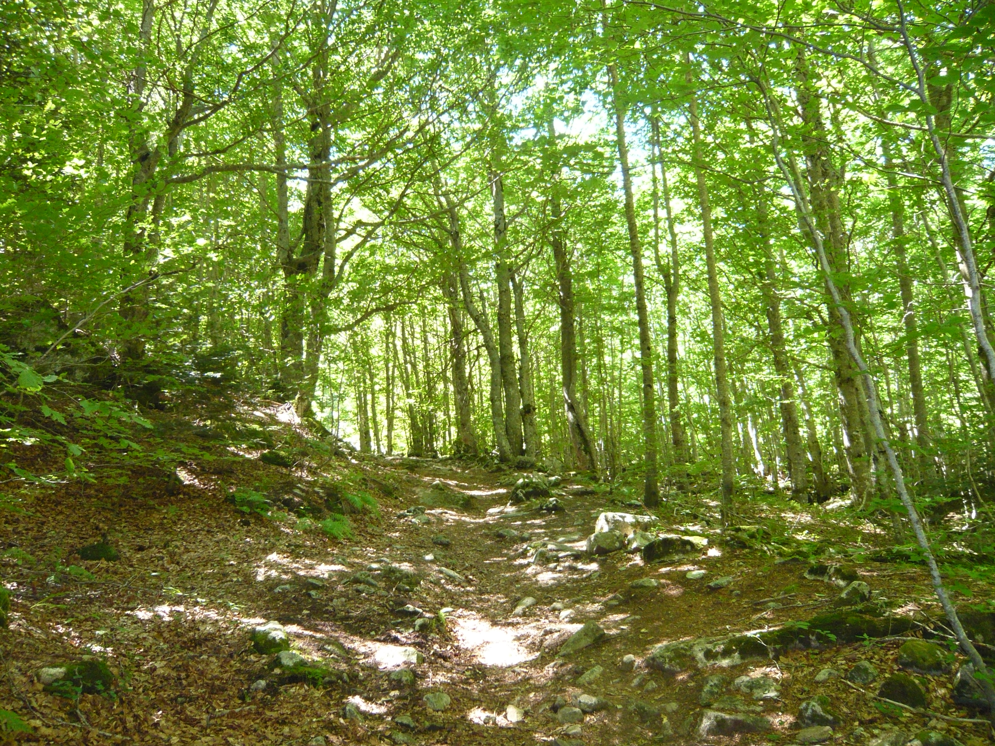 ¿Os he dicho alguna vez que me encantan los hayedos?